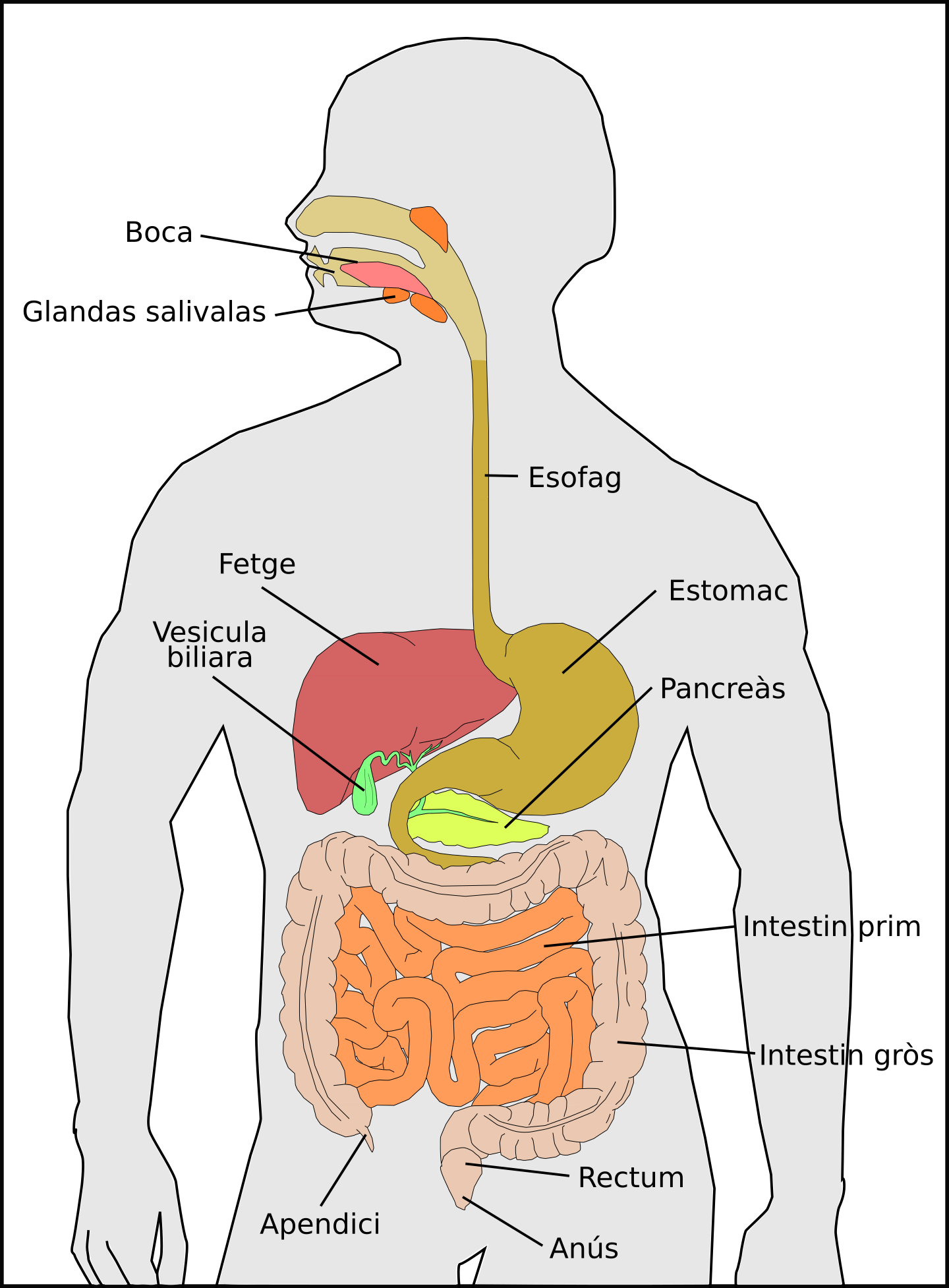 Organizacion generala dau sistèma digestiu uman